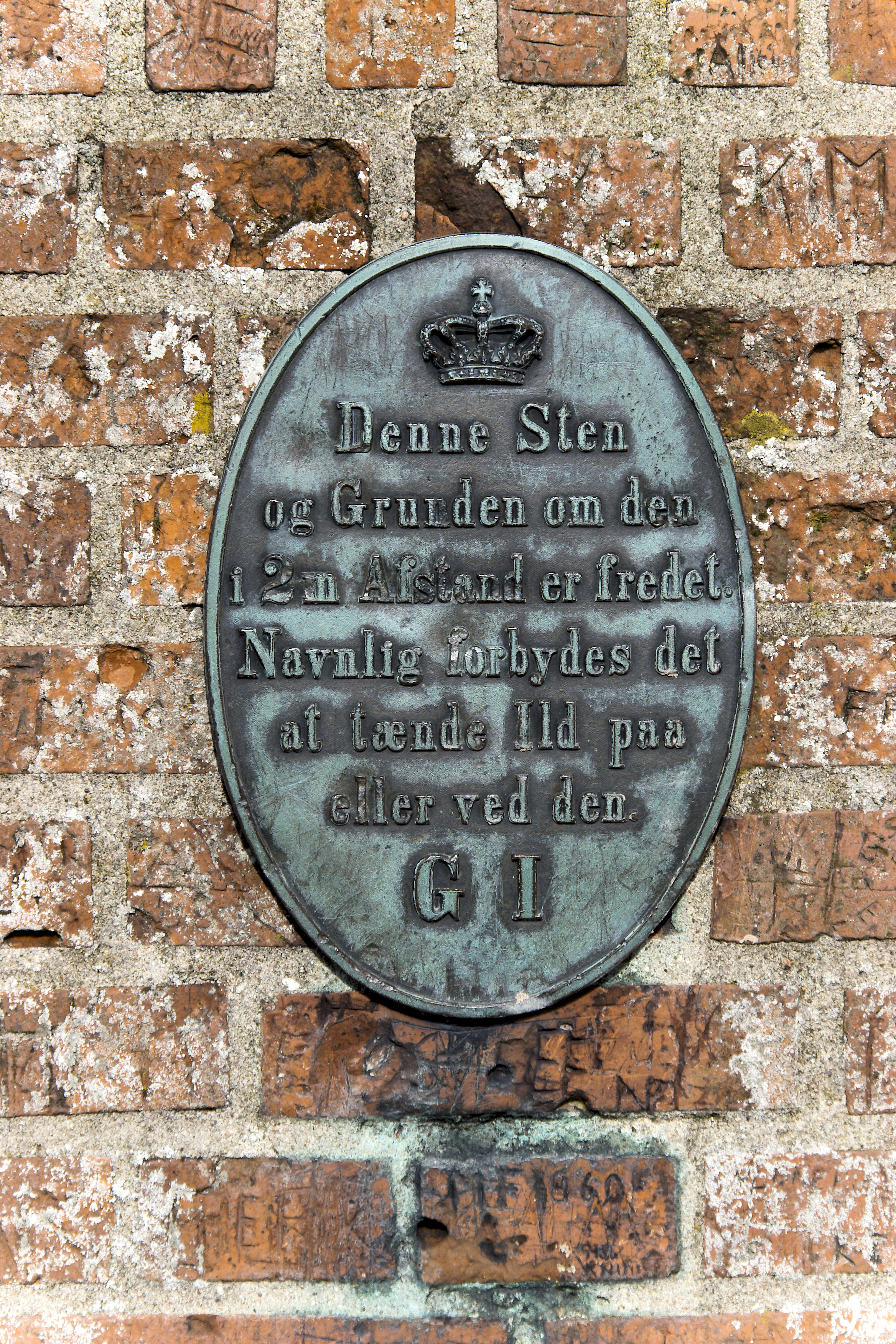 Skilt på postament på Agri Baunehøj